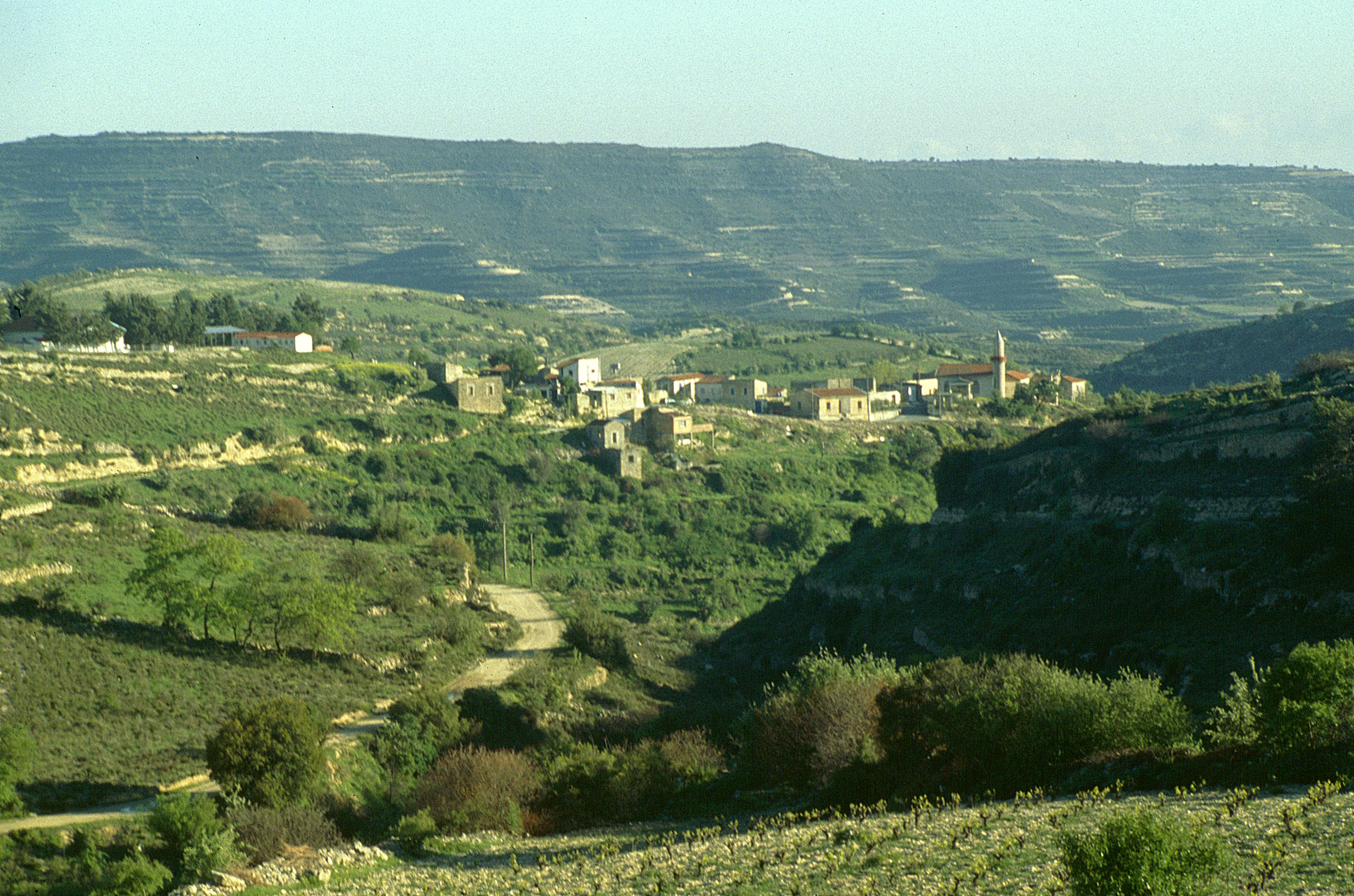 Mandria